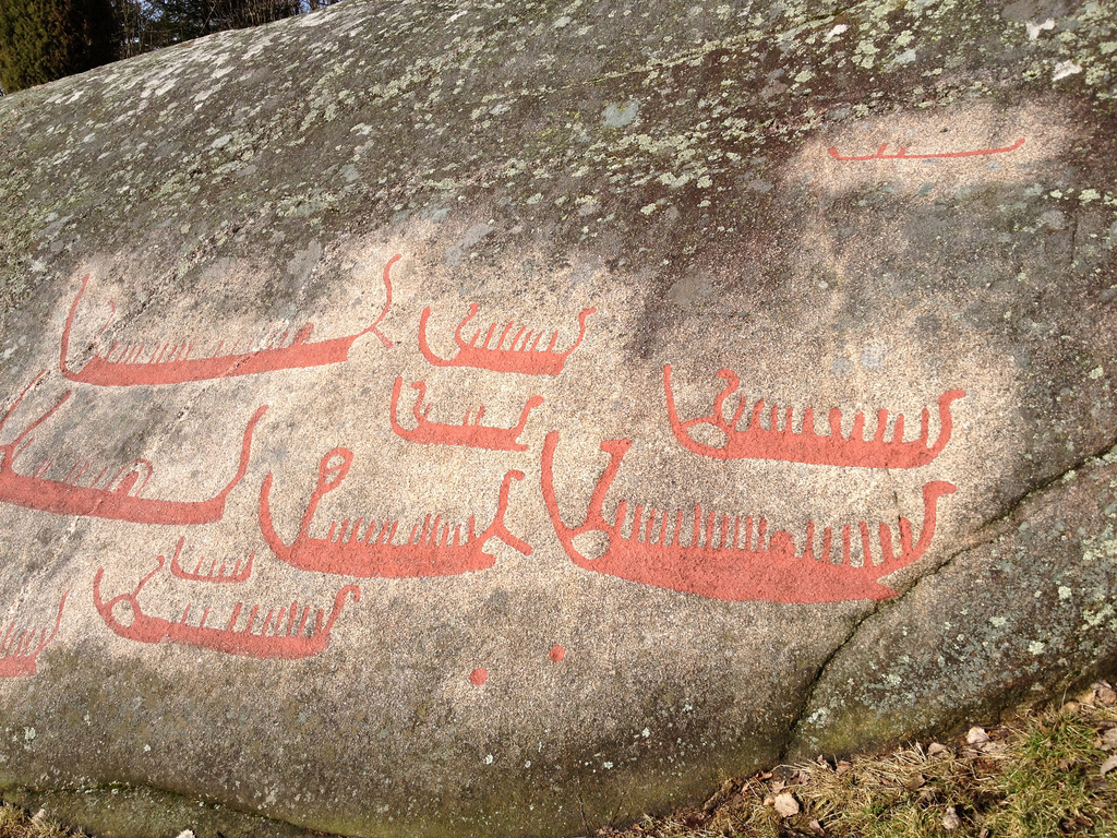 Helleristninger på Solberg